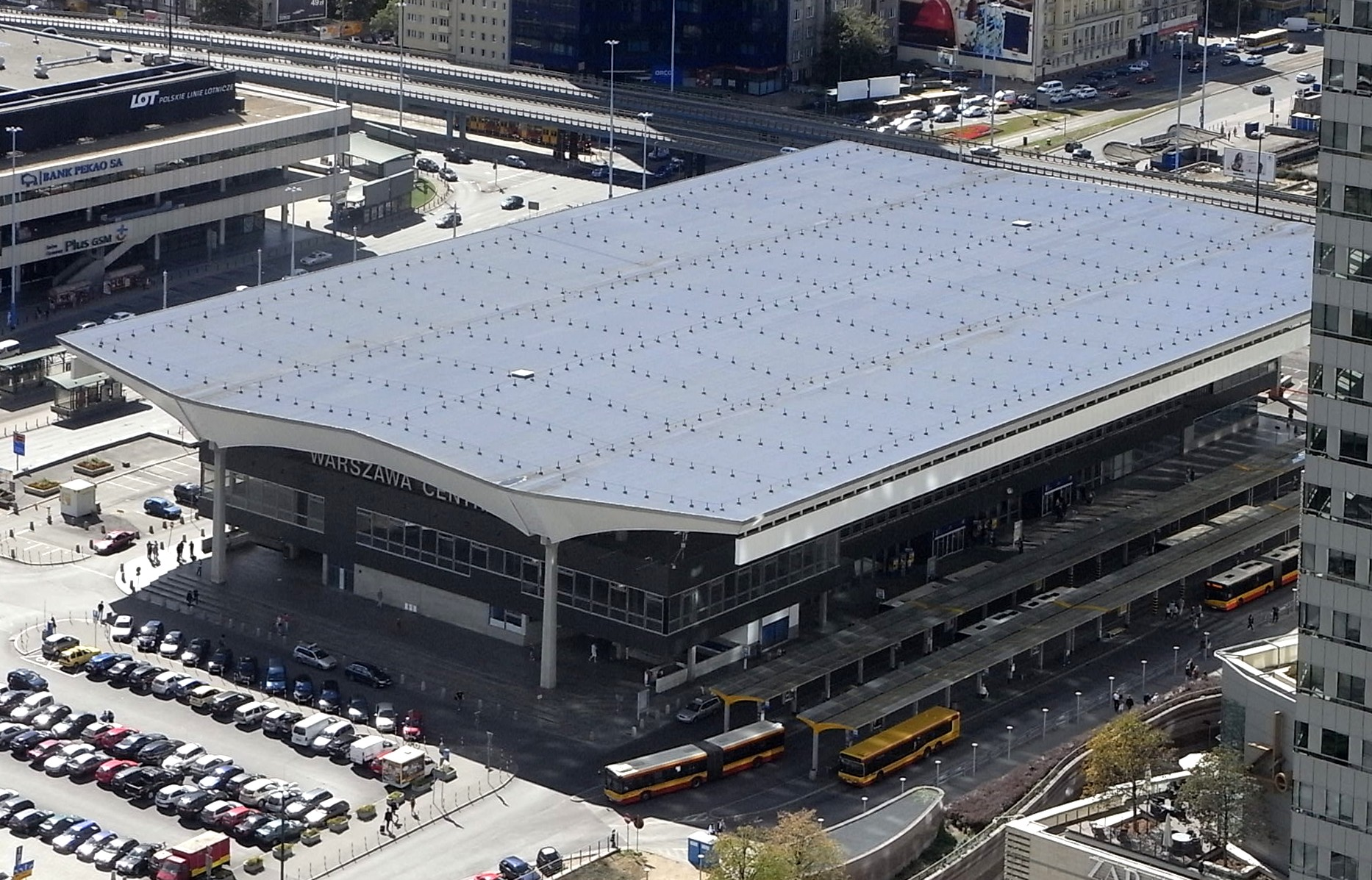 Bahnhof "Centralna" in Warschau, von der Aussichtsplattform des Kulturpalasts aus gesehen.